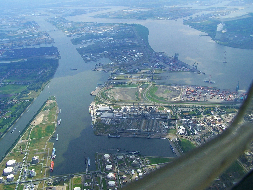 Kanaaldok